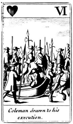 Popish Plot Playcard 7 Coleman wird zu seiner Excetion gebracht